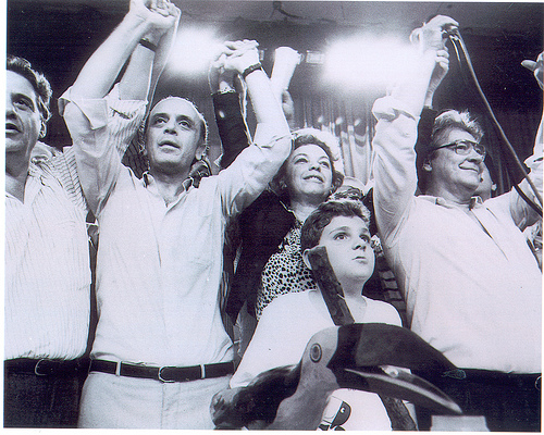 Fernando Henrique Cardoso, José Serra e Mário Covas.